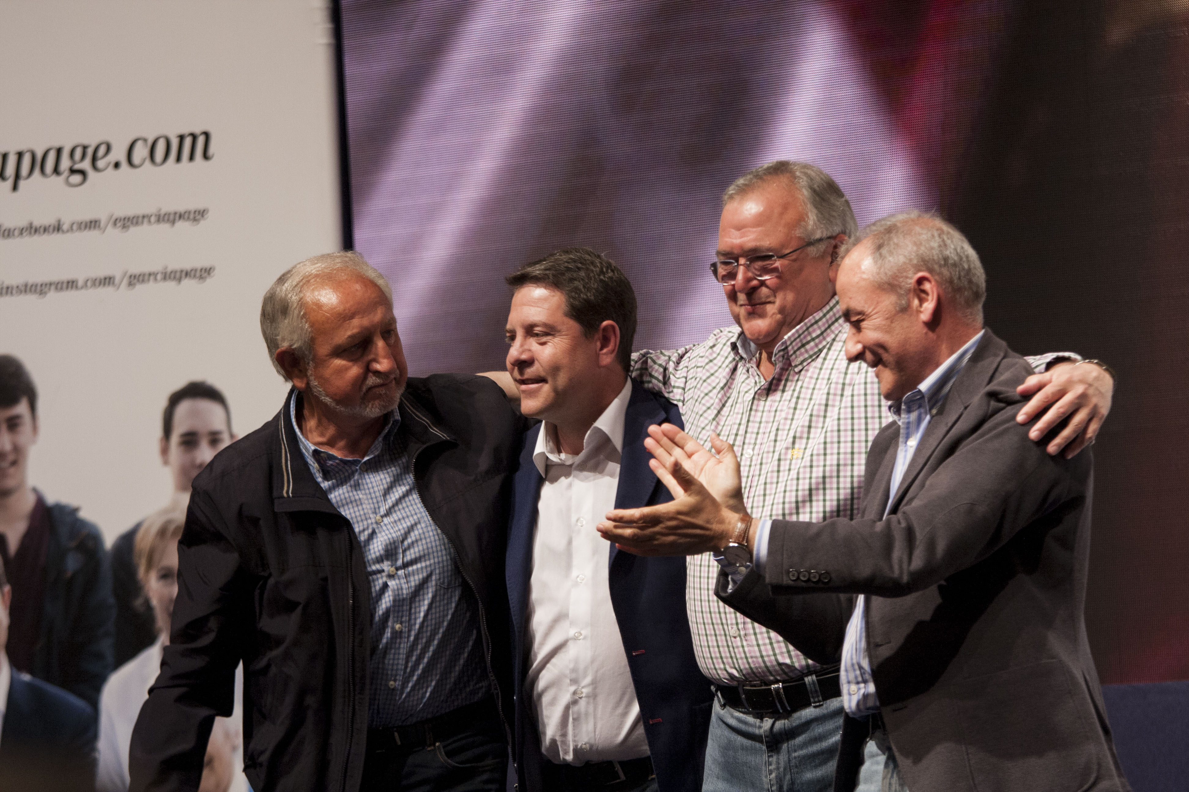 Acto público en Talavera de la Reina